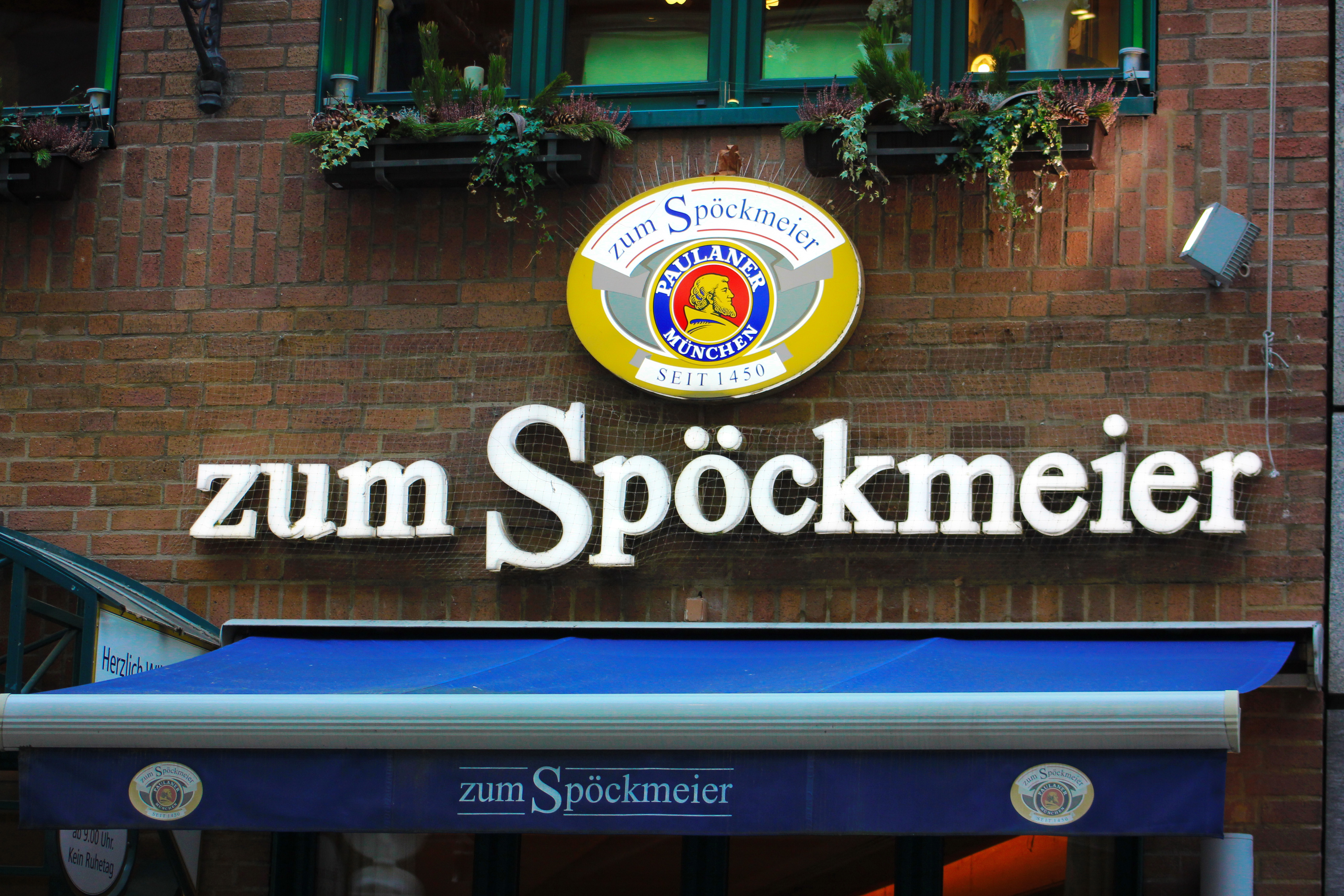 Leuchtschild der Gaststätte "zum Späckmeier" in München mit Schild des Paulanerbiers.